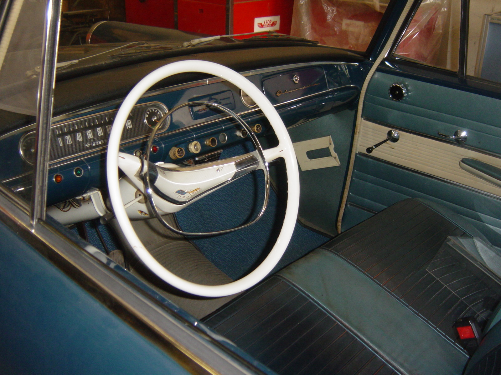 Opel Rekord P2